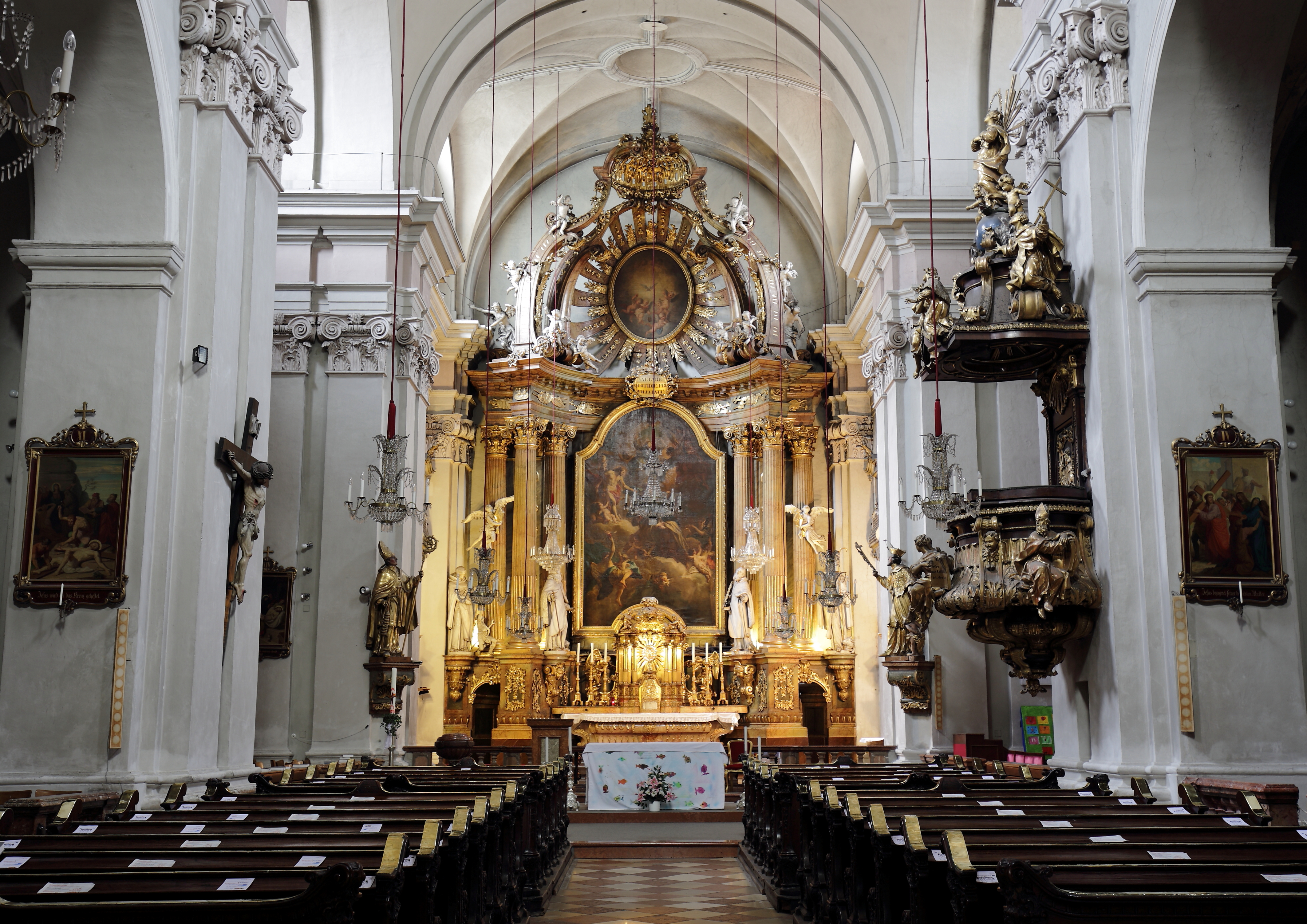 Innenansicht der Karmeliterkirche im 2. Wiener Gemeindebezirk Leopoldstadt.Eine ehemalige Klosterkirche, die 1639 erstmals geweiht wurde und seit 1783 die Funktion Pfarrkirche hl. Josef inne hat. Der Hochaltar wurde nach einem Entwurf von Jakob Schletterer errichtet. Das Altarbild mit dem Thema "Vision der heiligen Theresia" ist ein Werk von Martin Johann Schmidt aus dem Jahr 1771. Flankiert wird es von den von Jakob Schletterer geschaffenen Statuen (von links nach rechts): Heiliger Andreas Corsini, Prophet Elisäus, Prophet Elias und heiliger Cyrillus.